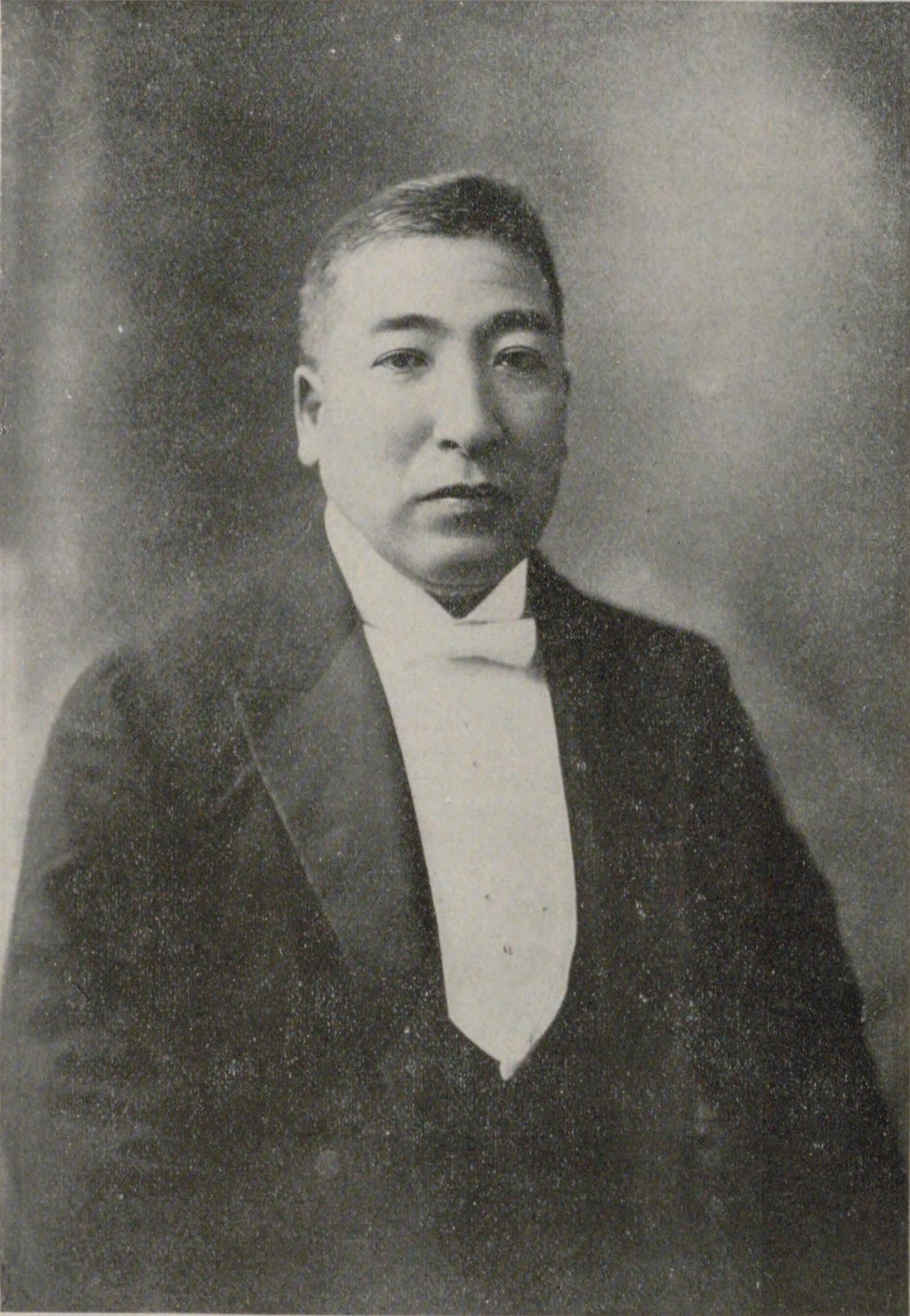 大正9年代議士当選当時の栗林五朔